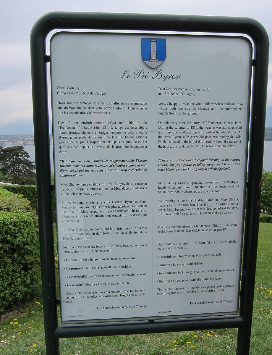 Tafel an der "Pre Byron" (Byron-Wiese) zum Gedanken an die Entstehung des "Frankenstein"